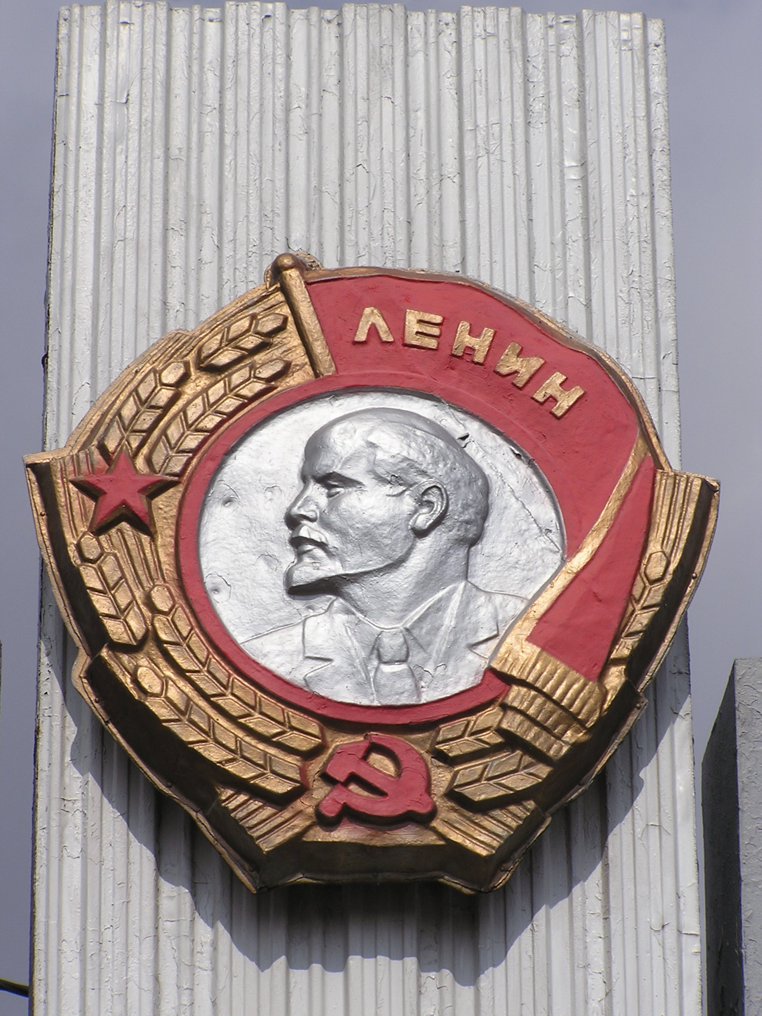 Донецк. Орден Ленина на указателе Донецка